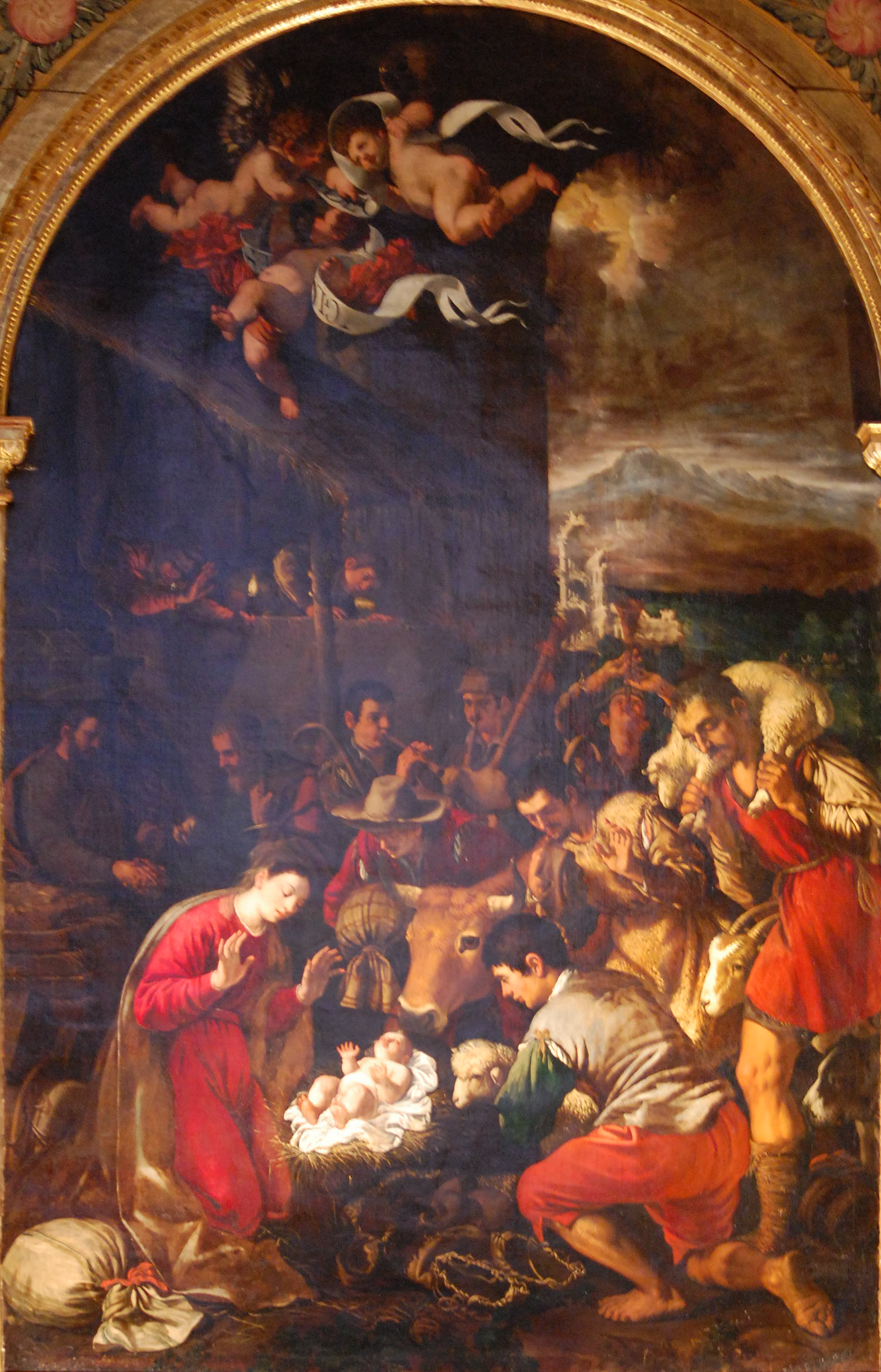 La obra representa el momento en que el Niño Jesús fue adorado por los pastores de Belén poco después de su nacimiento.